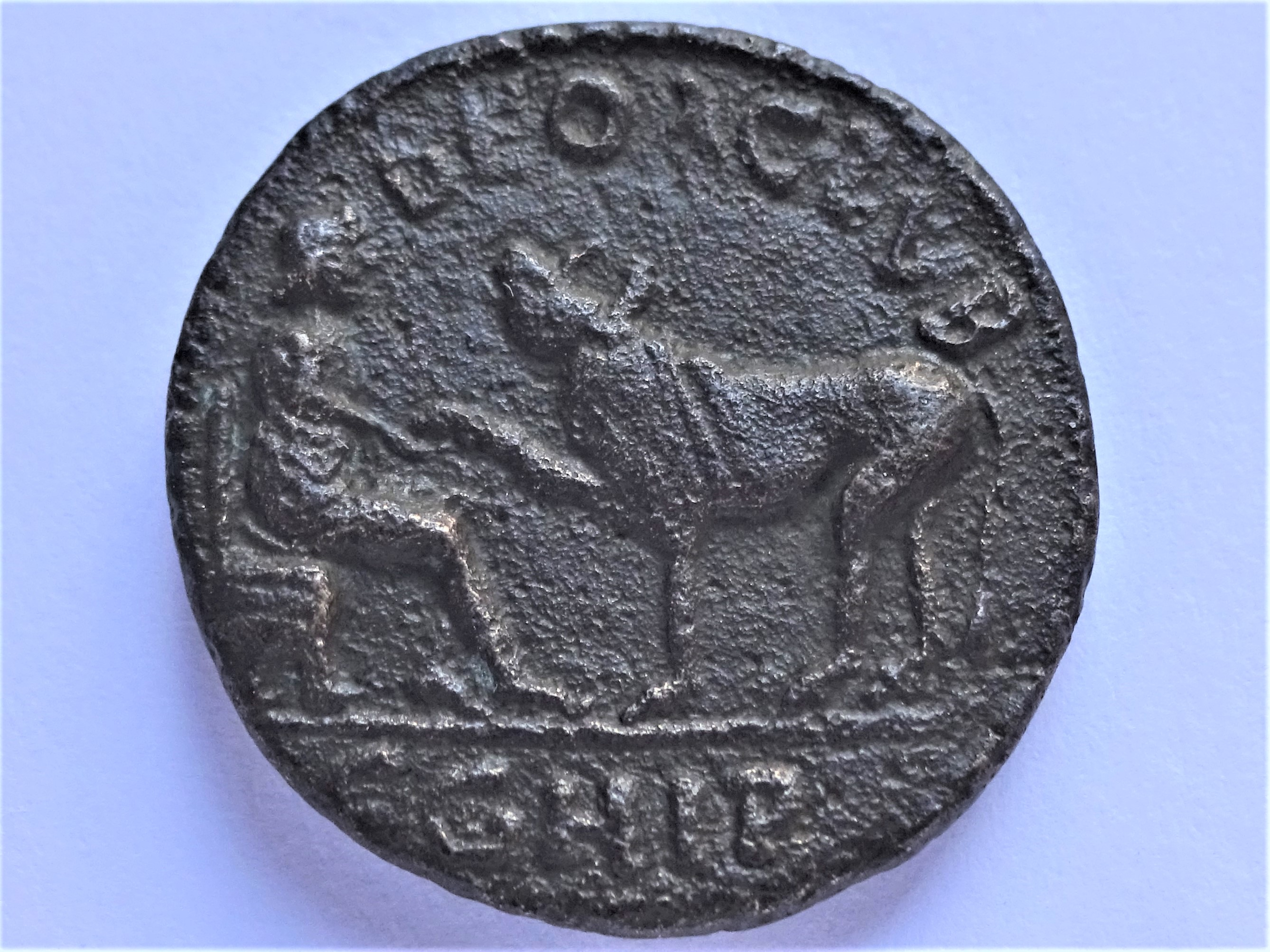 Asklepios den Huf eines Stiers untersuchend, auf Bronzemünze aus Parium (Mysia) z.Zt. des Kaisers Alexander Severus, Roman Provincial Coinage, VI 3871